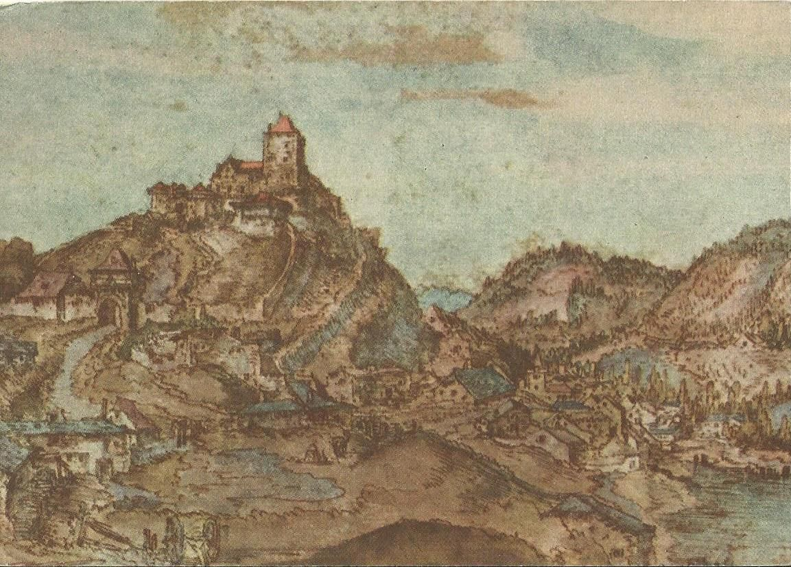 Alte Ansicht Wörth an der Donau mit Burg